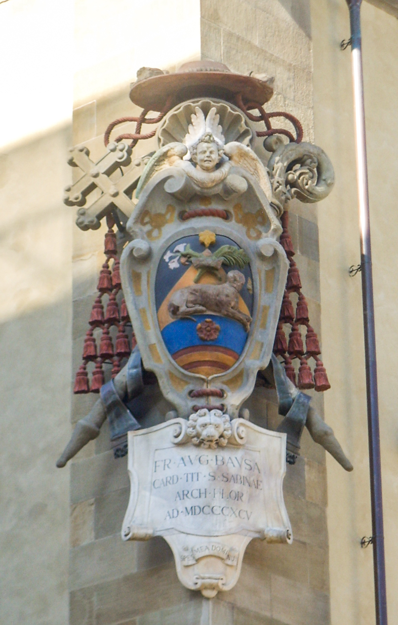 Stemma di Agostino Bausa, nel cortile del palazzo arcivescovile di Firenze.